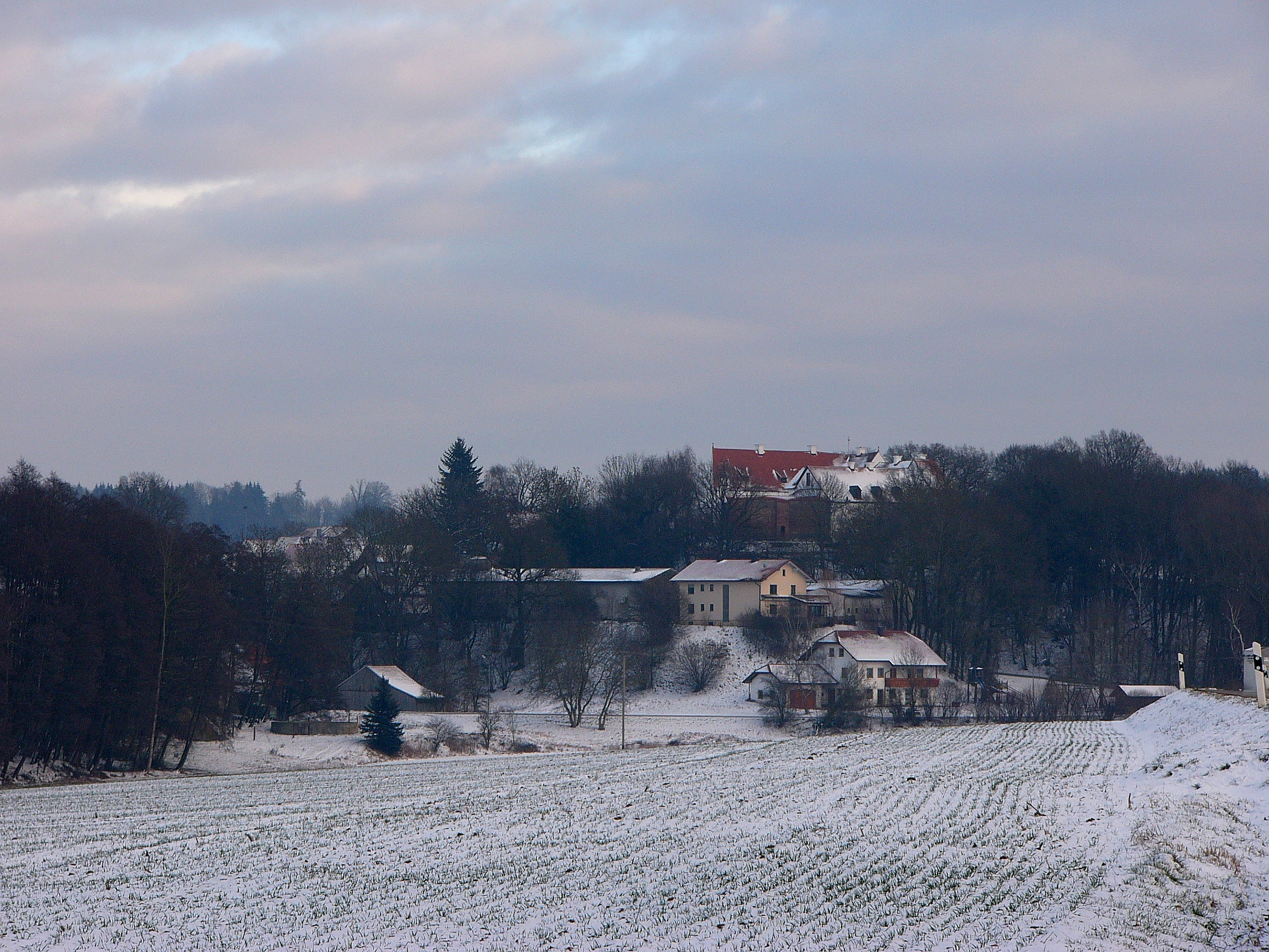 Blick auf Kirchberg - Ortsteil von Hohenthann. In der Mitte die Burg Kirchberg.